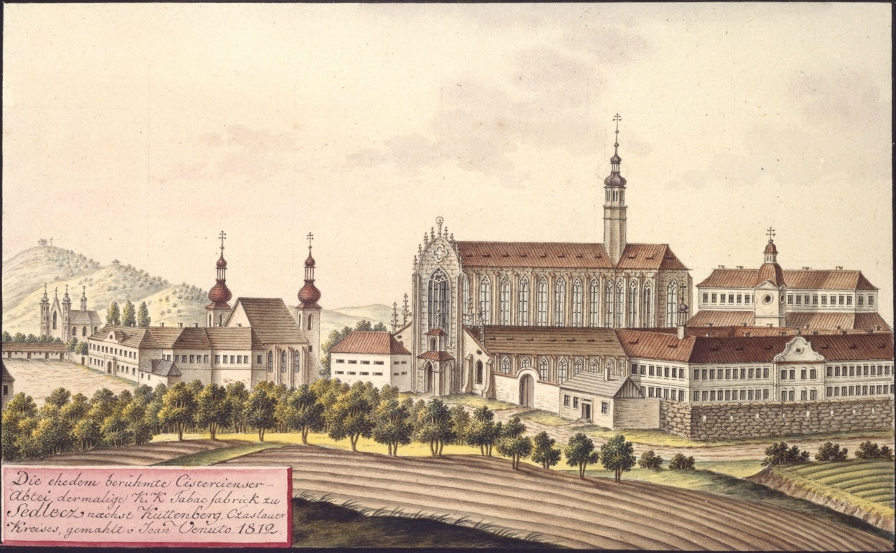 Klášter Sedlec Kutná Hora. Die ehedem berühmte Cistercienser-Abtei, dermalige k.k. Tabacfabrick zu Sedlecz naechst Kuttenberg, Czaslauer Kreises, gemahlt v. Joann Venuto 1812